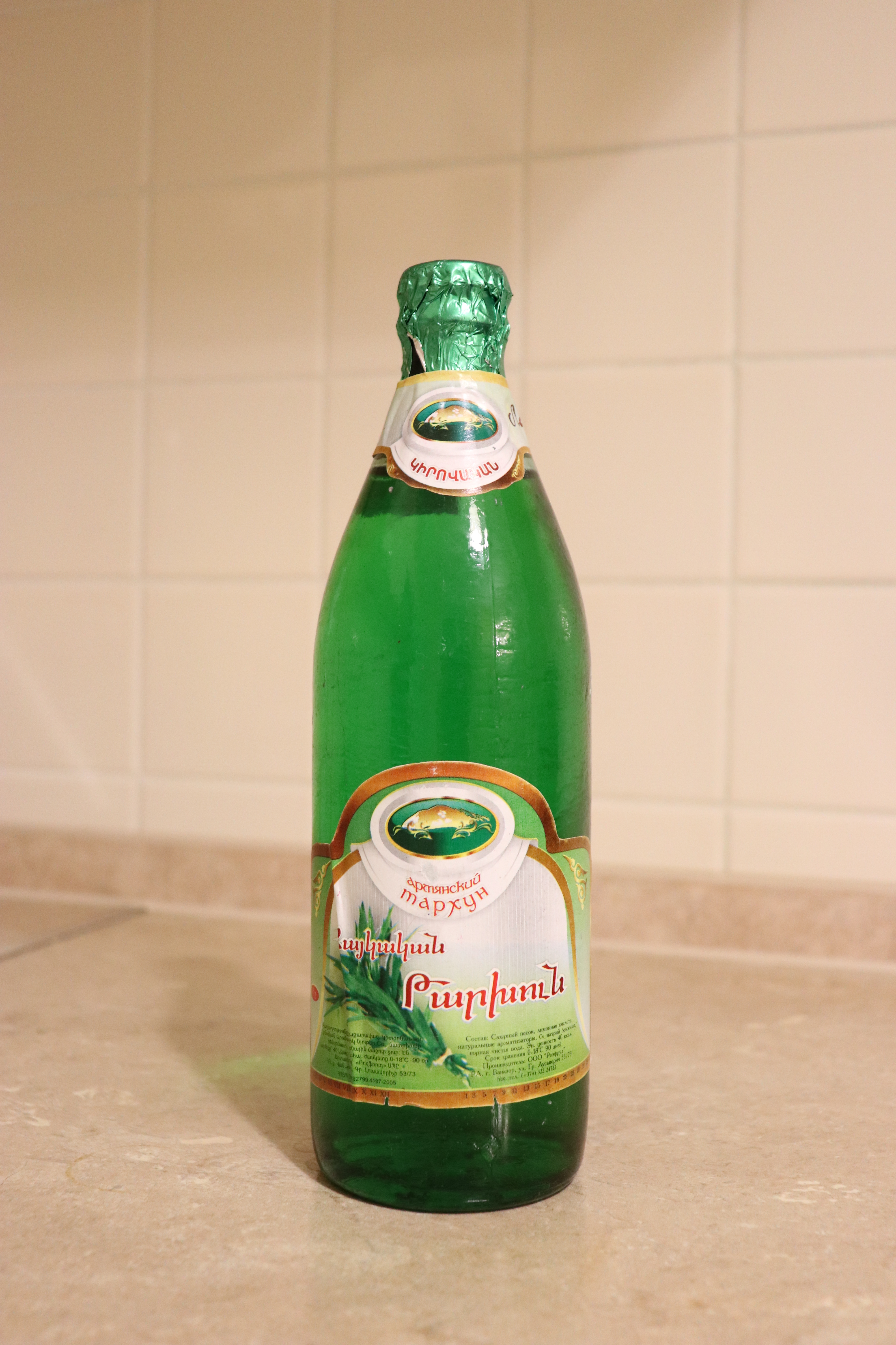 Армянский тархун